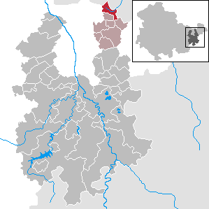 Pölzig in Thuringia - District Greiz